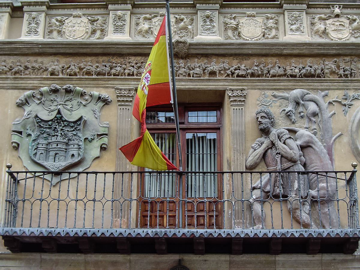 Tarazona 00022.jpg